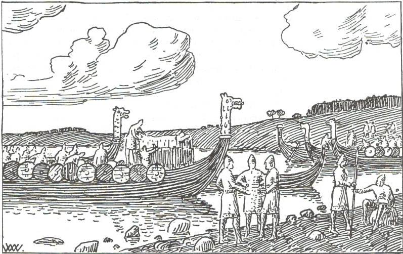 Wilhelm Wetlesen: Illustration for Harald Hardrådes saga, Heimskringla 1899-edition. nn: «Einar Tambarskjelve steller med liket til kong Magnus.»